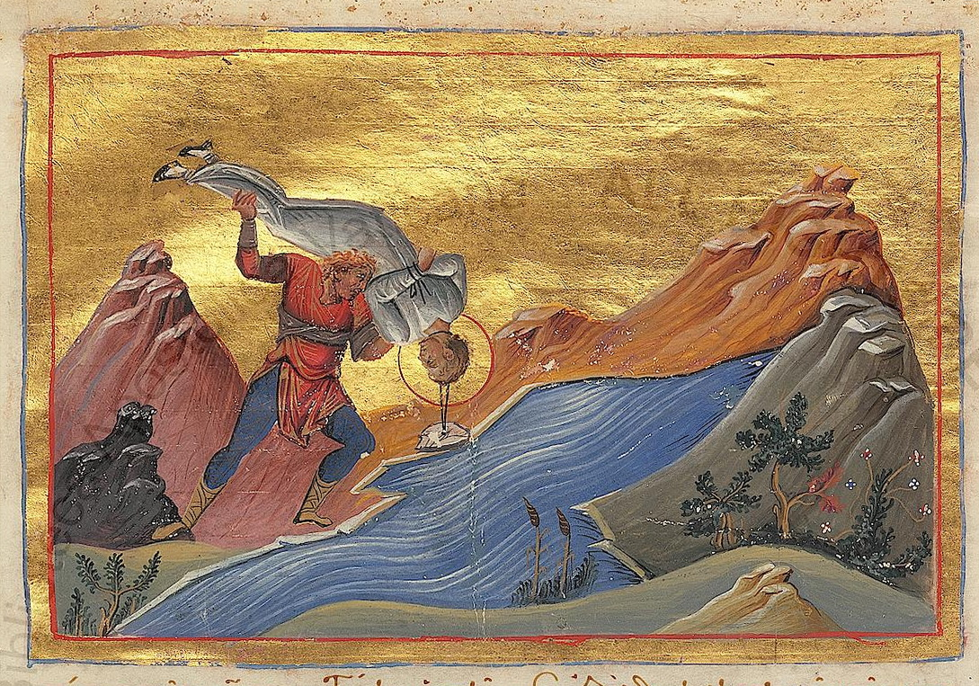 Харитина Амисийская (Понтийская), мц Константинополь. 985 г. Миниатюра Минология Василия II. Ватиканская библиотека. Рим.